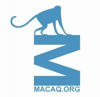 logo de l'association Macaq